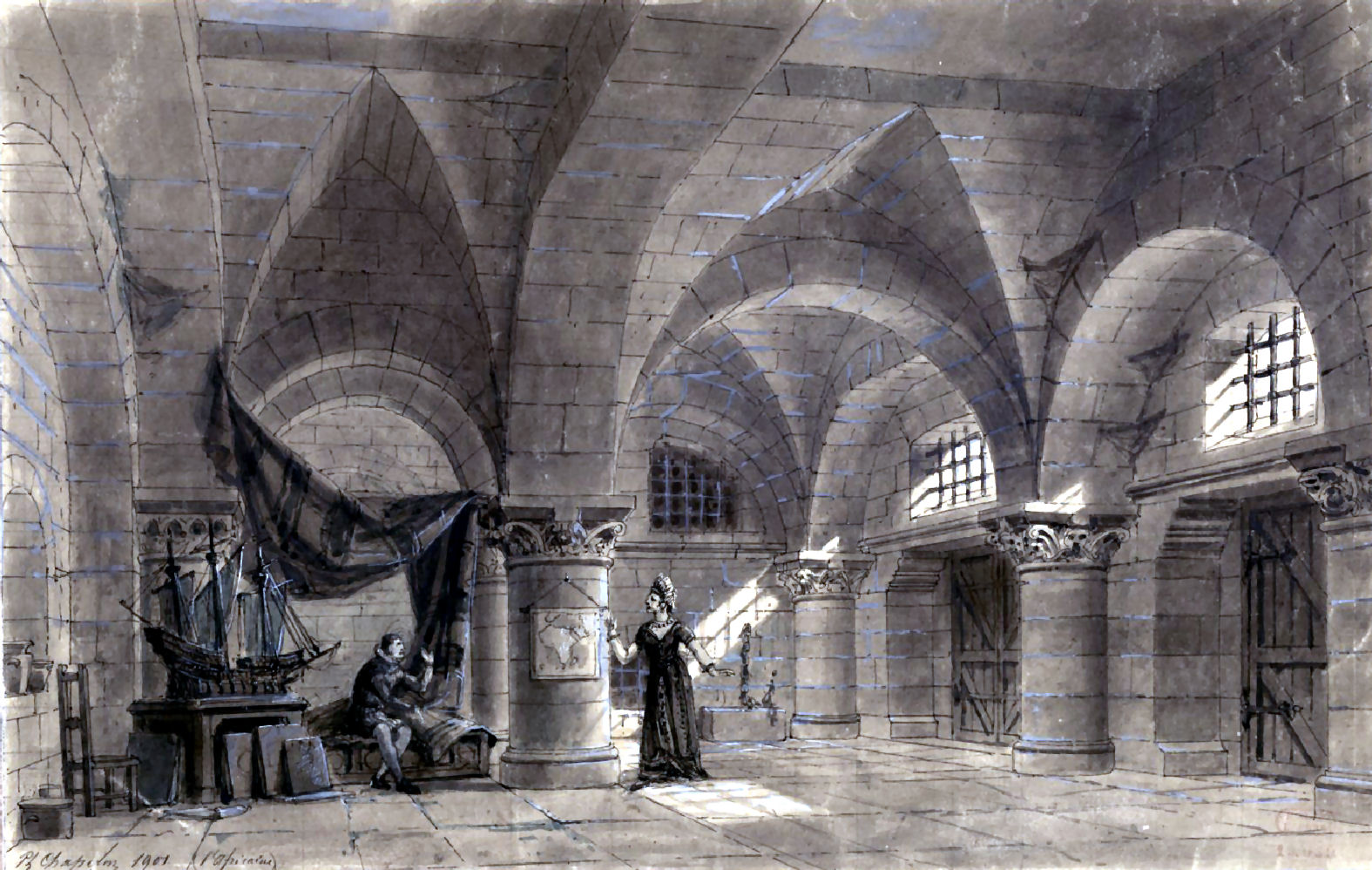 Esquisse de décor de l'acte II de L'Africaine de Meyerbeer par Philippe Chaperon